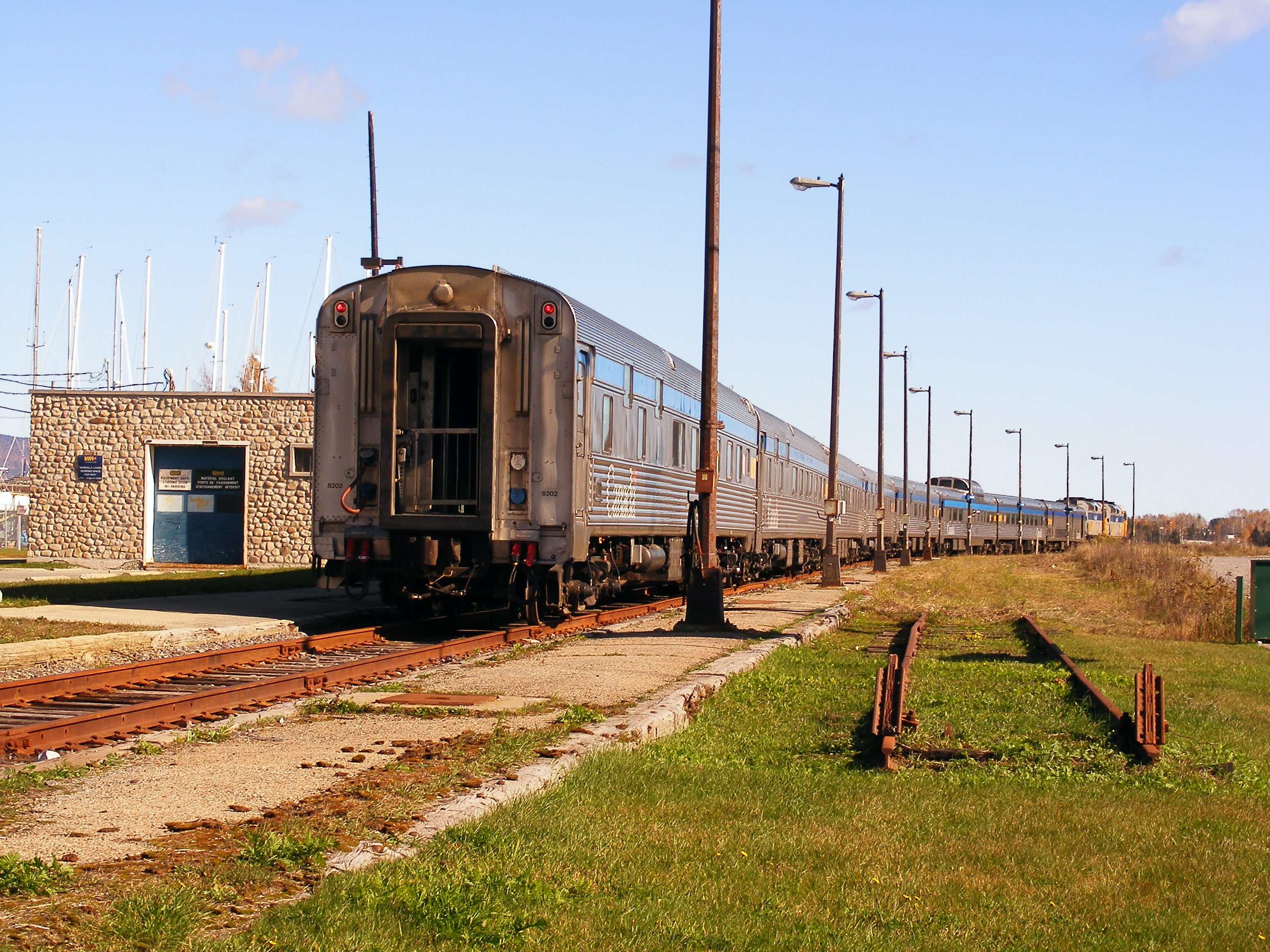 VIA Rail train parked at Gaspé Station in Gaspé, Québec, Canada.